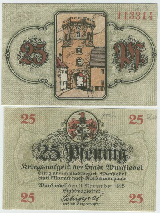 Notgeld aus Wunsiedel: 25 Pfennig Kriegsnotgeld der Stadt Wunsiedel von 1918 (verschiedene Stadtansichten auf der Rückseite)